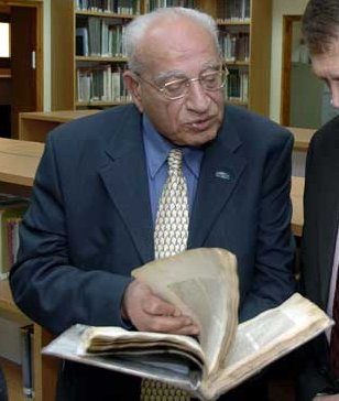 Mordechai Ben-Porat